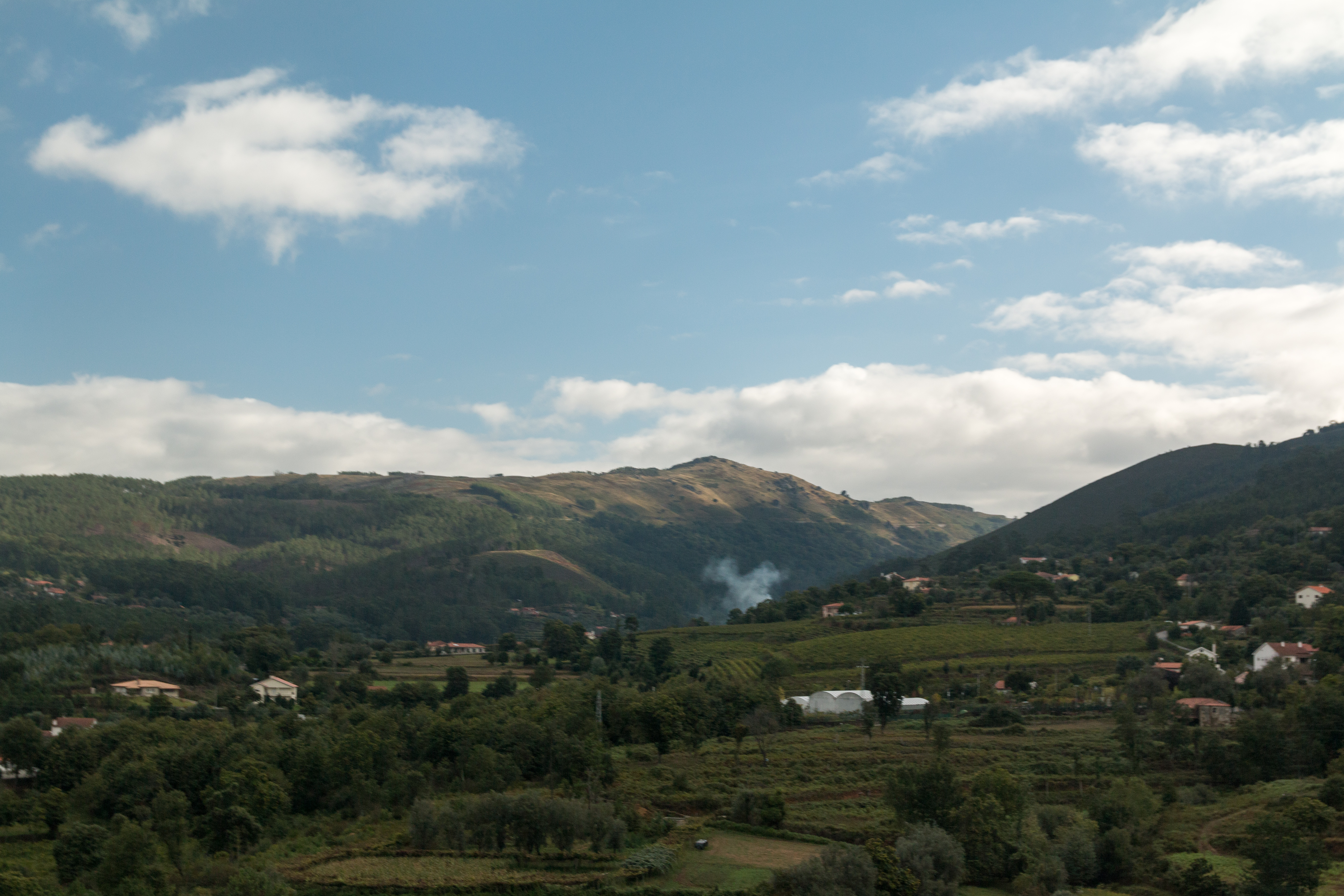 Corno do Bico Protected Landscape, near Corno do Bico Protected Landscape.